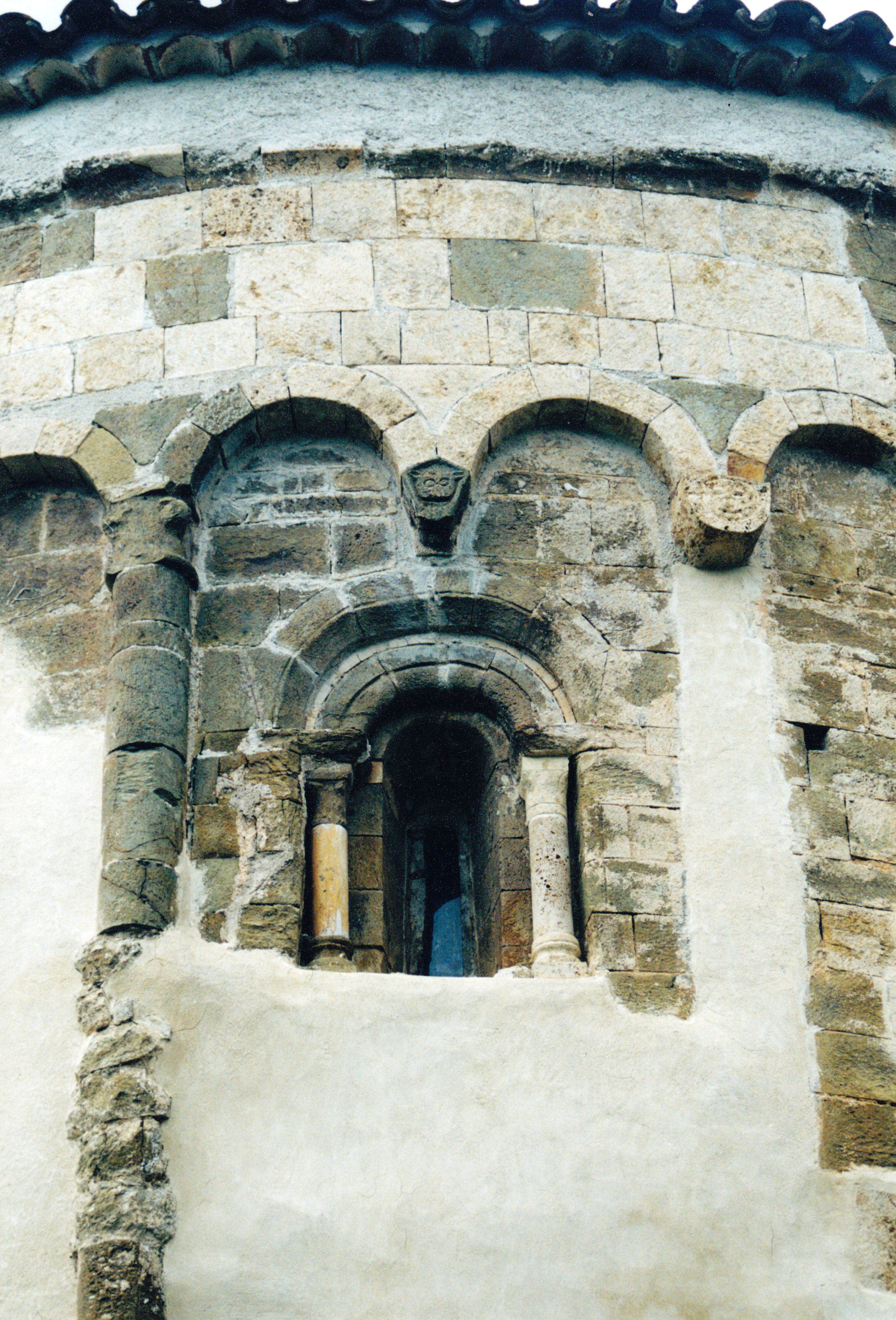 France - Pyrénées-Orientales - Aspres - Église Saint-Félix de Calmeilles